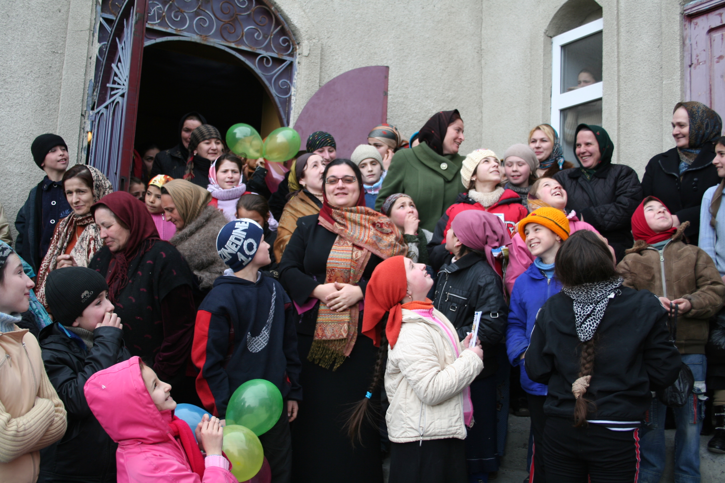 Запуск шаров мира и толерантности в сел. Ботлих.